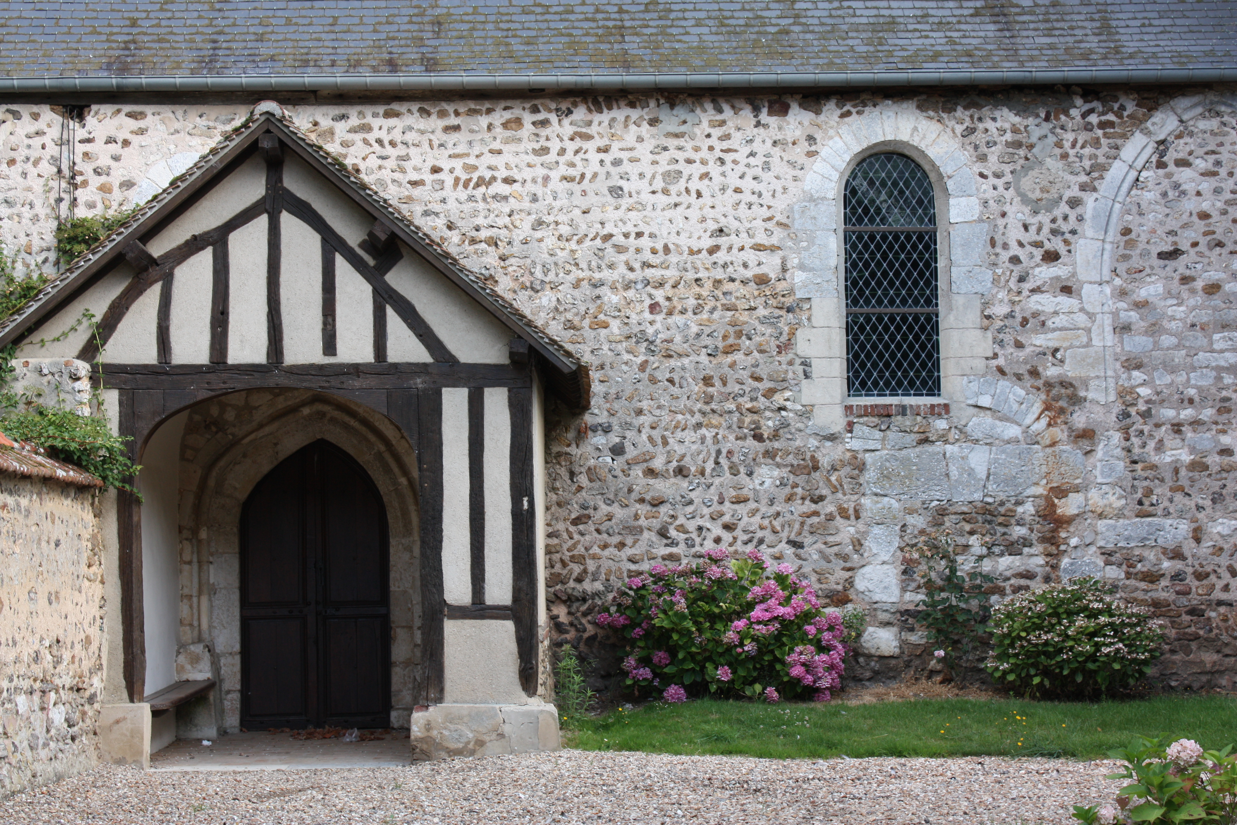 Ailly - Eglise Saint-Médard